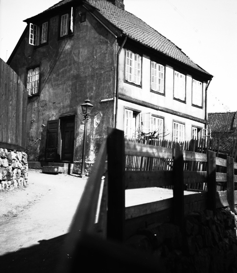 Sorgenfribakken på Hammersborg med bygård. Foto: Ukjent/Oslo Museum ,ca. 1910-20.